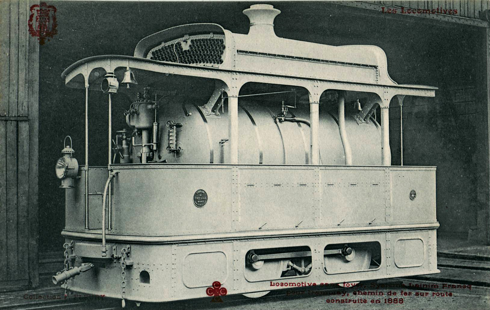 Carte postale ancienne éditée par F. Fleury - CCCC, collection Les locomotives : Locomotive sans foyer, système Lamm et Francq pour tramway, chemin de fer sur route, construite en 1888.La plaque de constructeur de Fives-Lilles est clairement visible